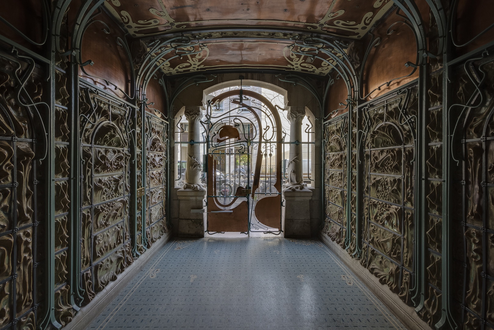 Le Castel Béranger par Hector Guimard / Gate of Castel Béranger